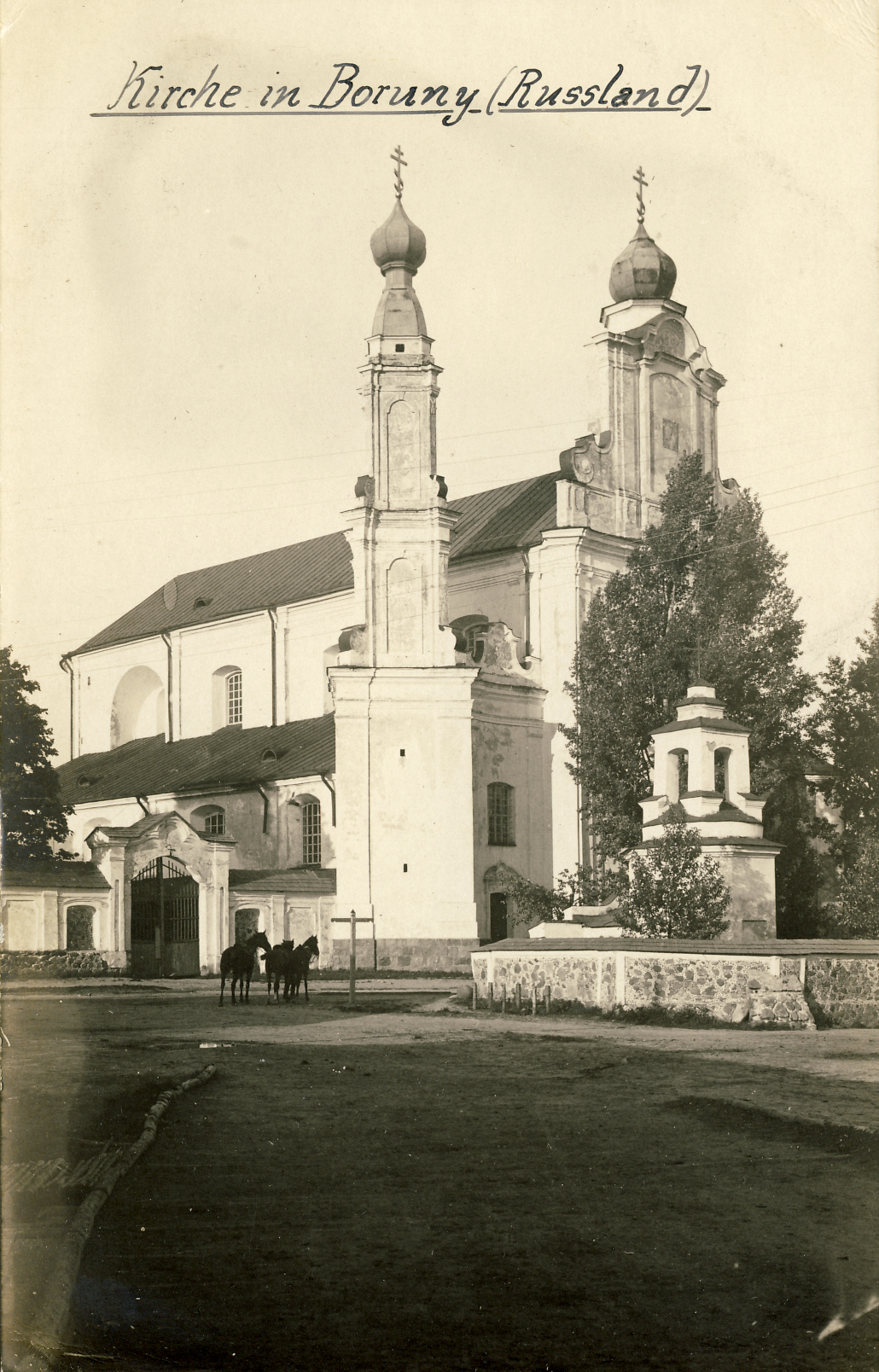 Беларуская (тарашкевіца): Баруны (Baruny), пляц Рынак (plac Rynak). Царква і манастыр базылянаў